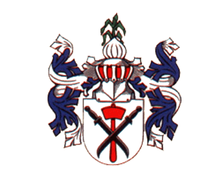 In Silber zwei gekreuzte, schwarze Weinmesser vor einem roten Hammer. Eine Knoblauchzwiebel als Helmzier, die Helmdecken in silber und blau. Wappen Knoblach, 1729 erstmals nachgewiesen